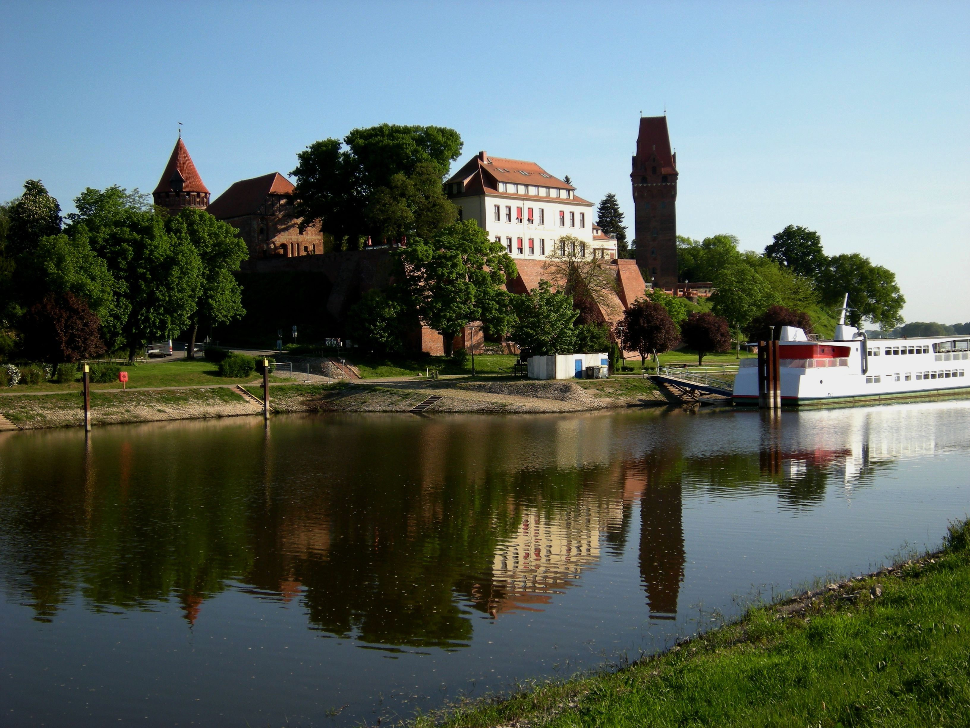 Tangermünde - Burg über der Elbe mit Ausflugsschiff